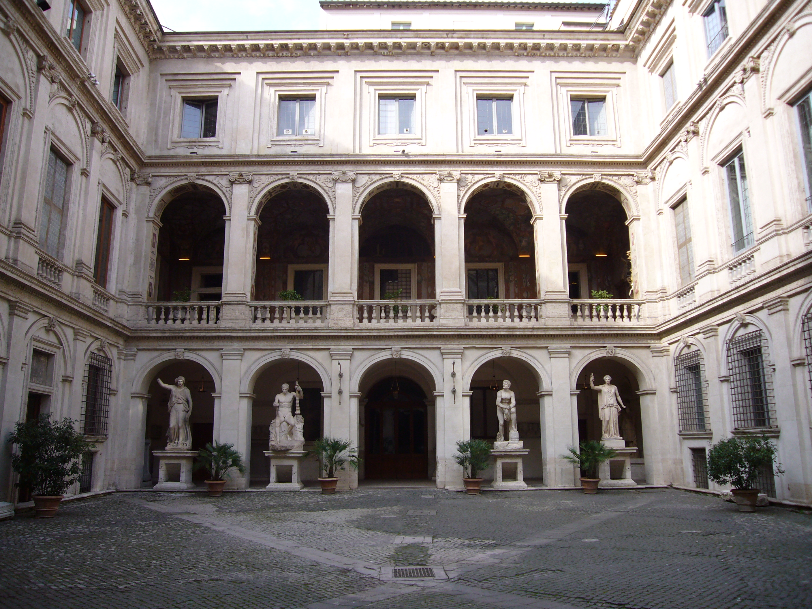 Roma, Palazzo Altemps: cortile maggiore